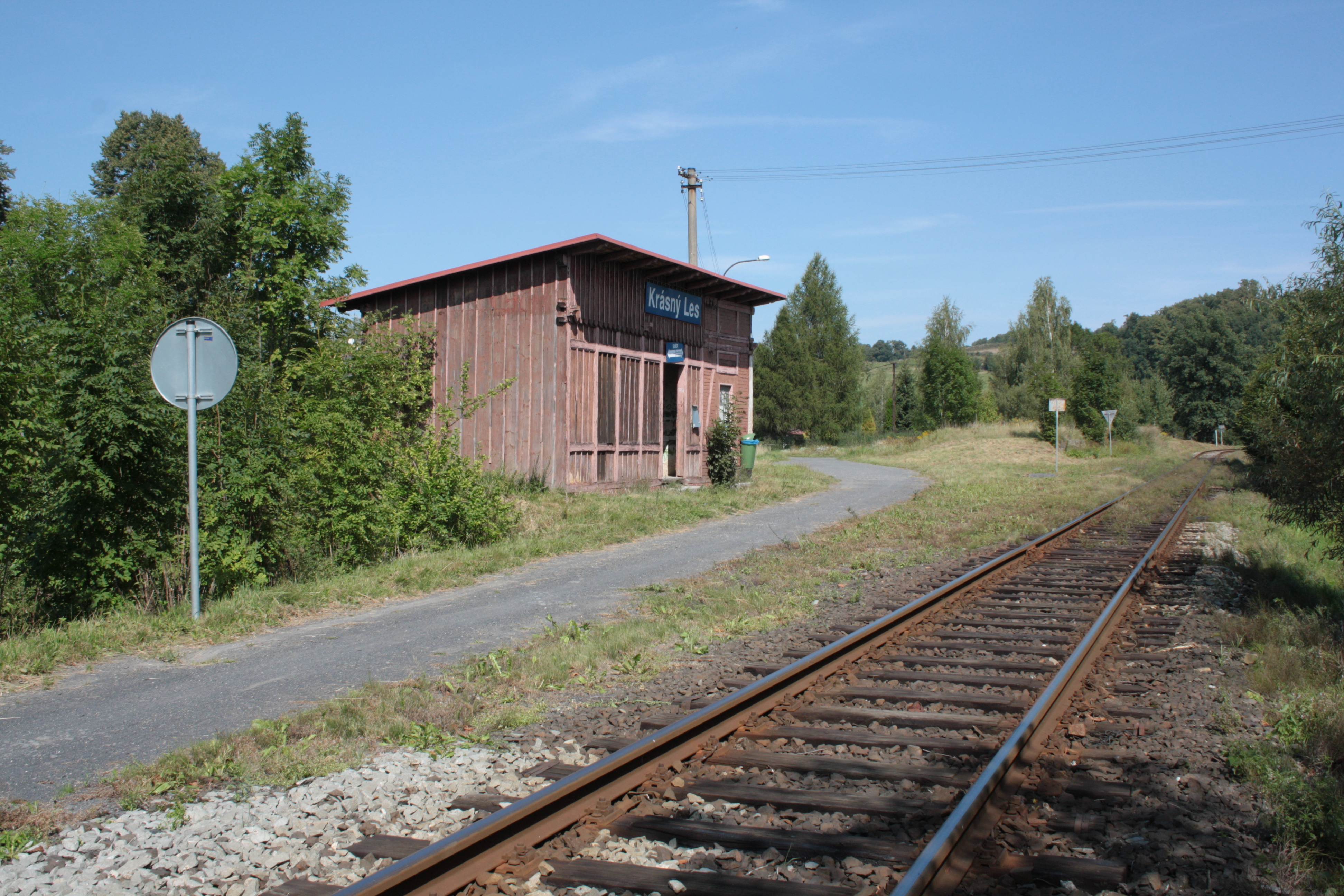 This photograph was taken with a DSLR from WMCZ's Camera grant. Pohled od jihu na čekárnu v železniční zastávce Krásný Les.